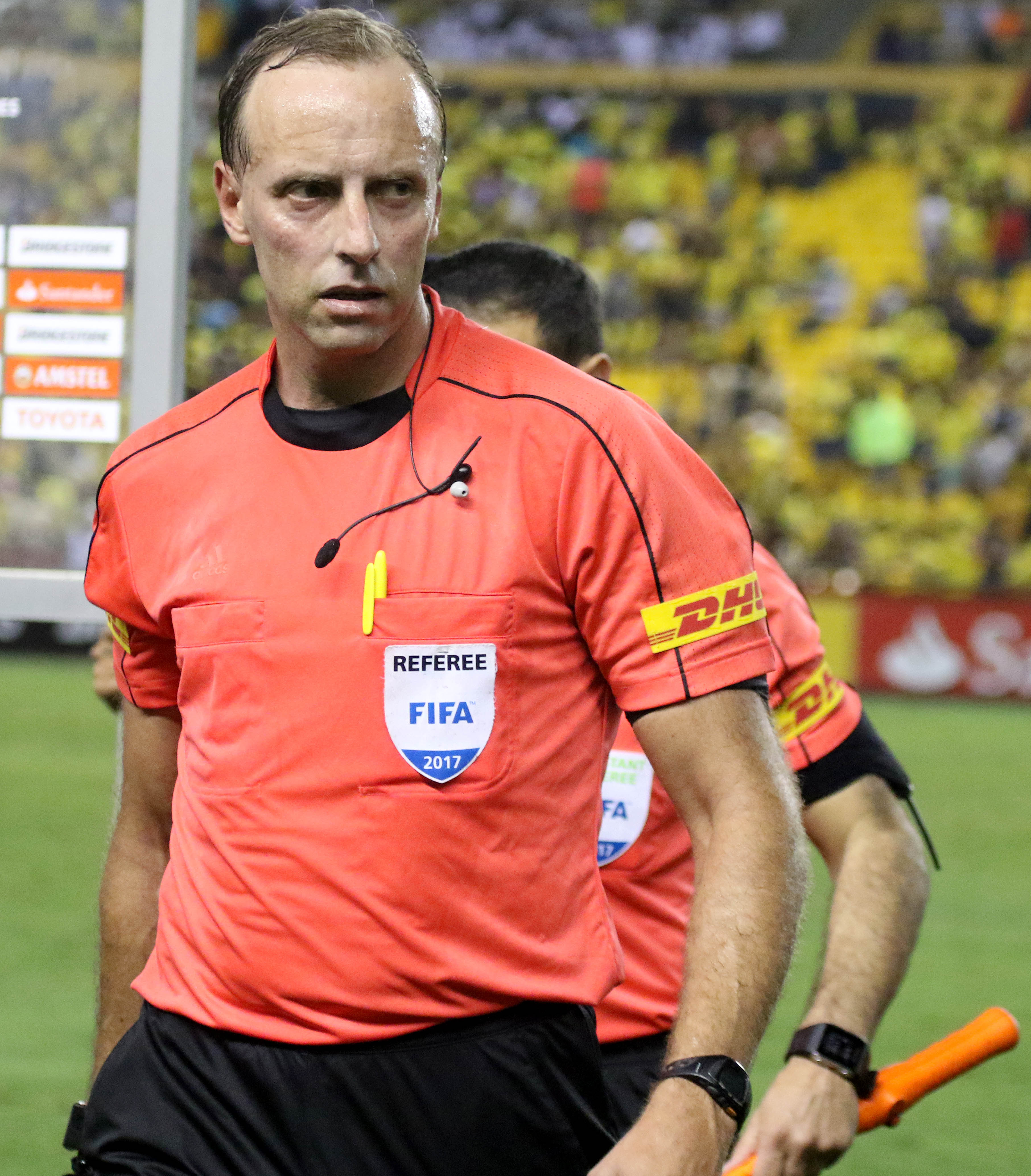 Guayaquil, 13 de septiembre del 2017 (Andes).-En el estadio Monumental Barcelona de Ecuador enfrenta al Santos de Brasil en partido de ida por cuartos de final de la Copa Libertadores Foto:Andes/César Muñoz Daniel Fedorczuk